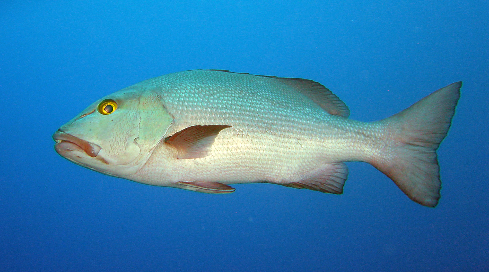 Perche de mer (Ha'amea en tahitien) (Lutjanus bohar)